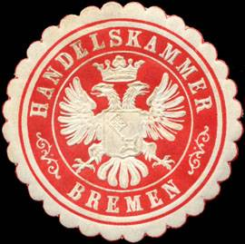 Sealing stamp Title: Handelskammer - Bremen Description: rot, weiß, geprägt Place: Bremen size: 4 cm